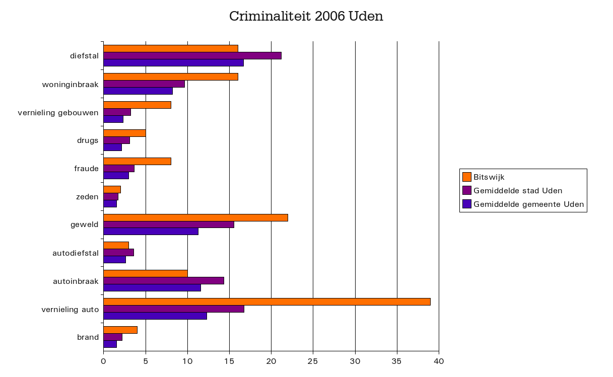 Criminaliteitcijfers in Uden Bitswijk (2006), Noord-Brabant, The Netherlands